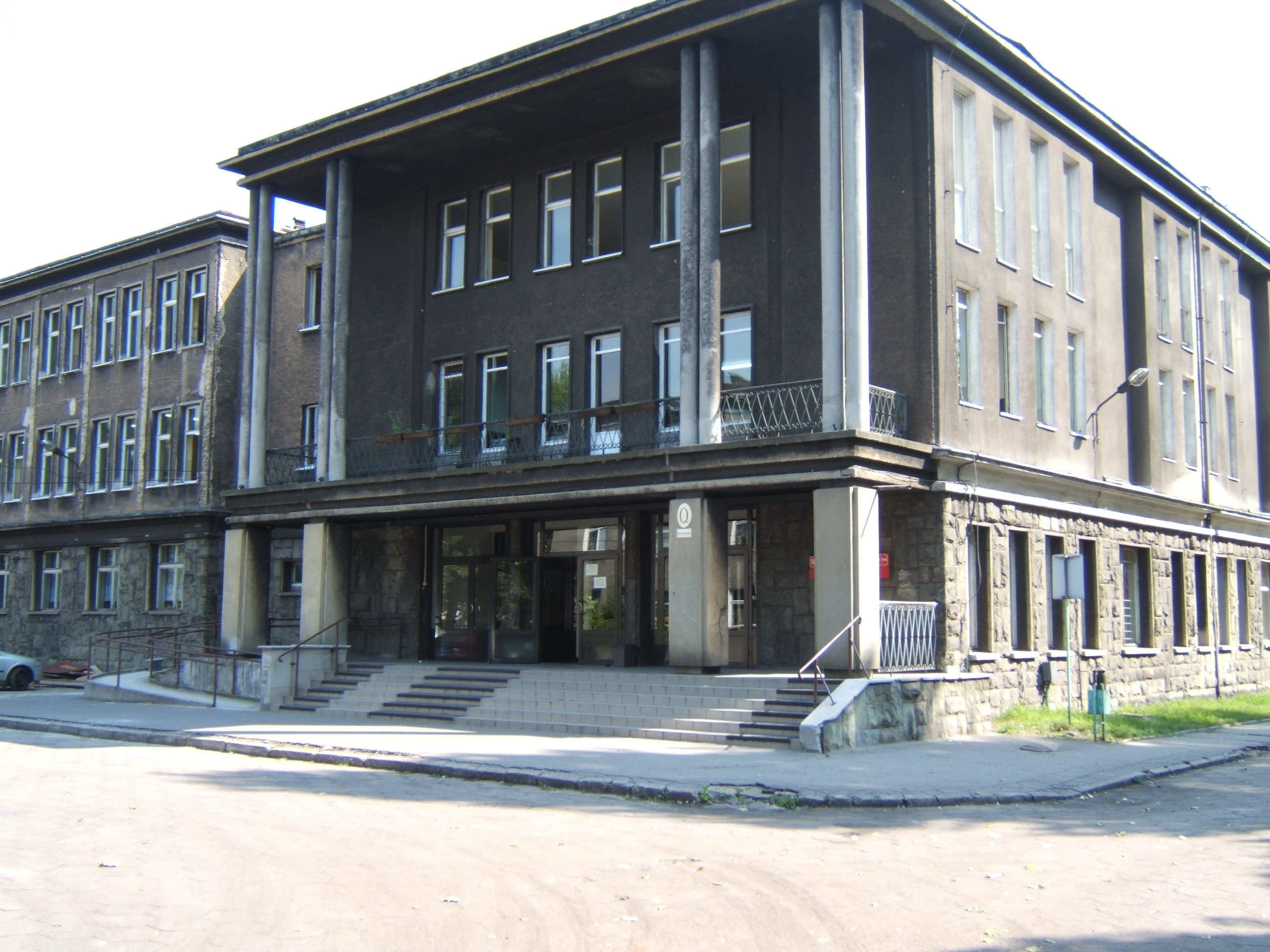 Główny budynek Śląskich Technicznych Zakładów Naukowych